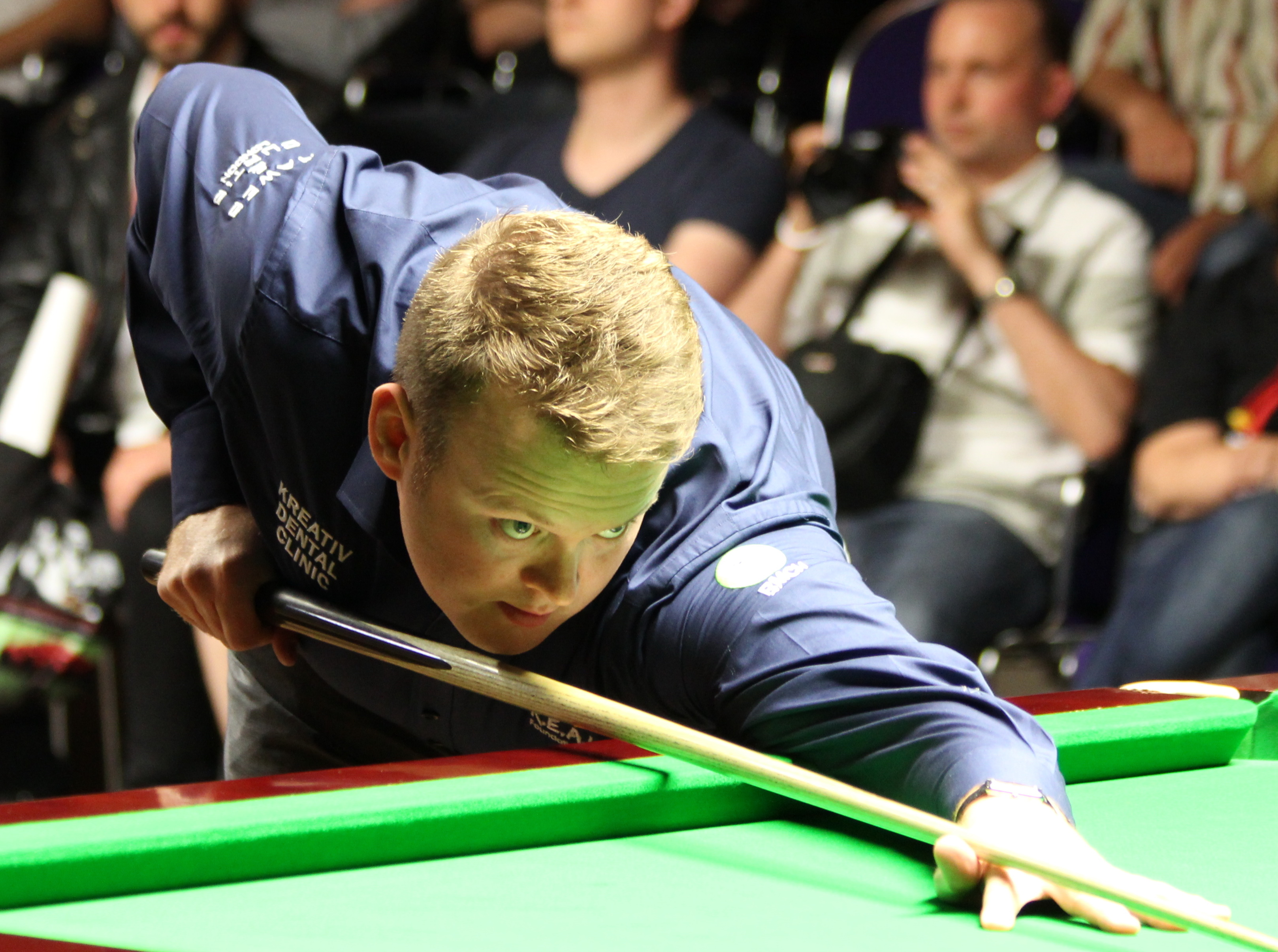 Shaun Murphy beim Paul Hunter Classic 2015